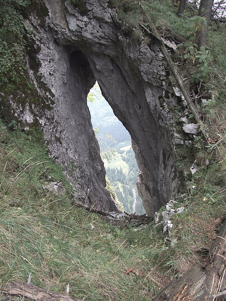 Wyżnie Zbójnickie Okno w masywie Organów w Dolinie Kościeliskiej w Tatrach